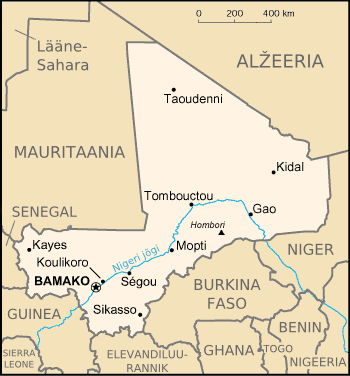 Mali kaart